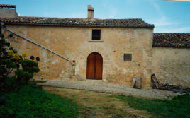 Cases de Binilagant Vell (possessió de Llucmajor, Mallorca)